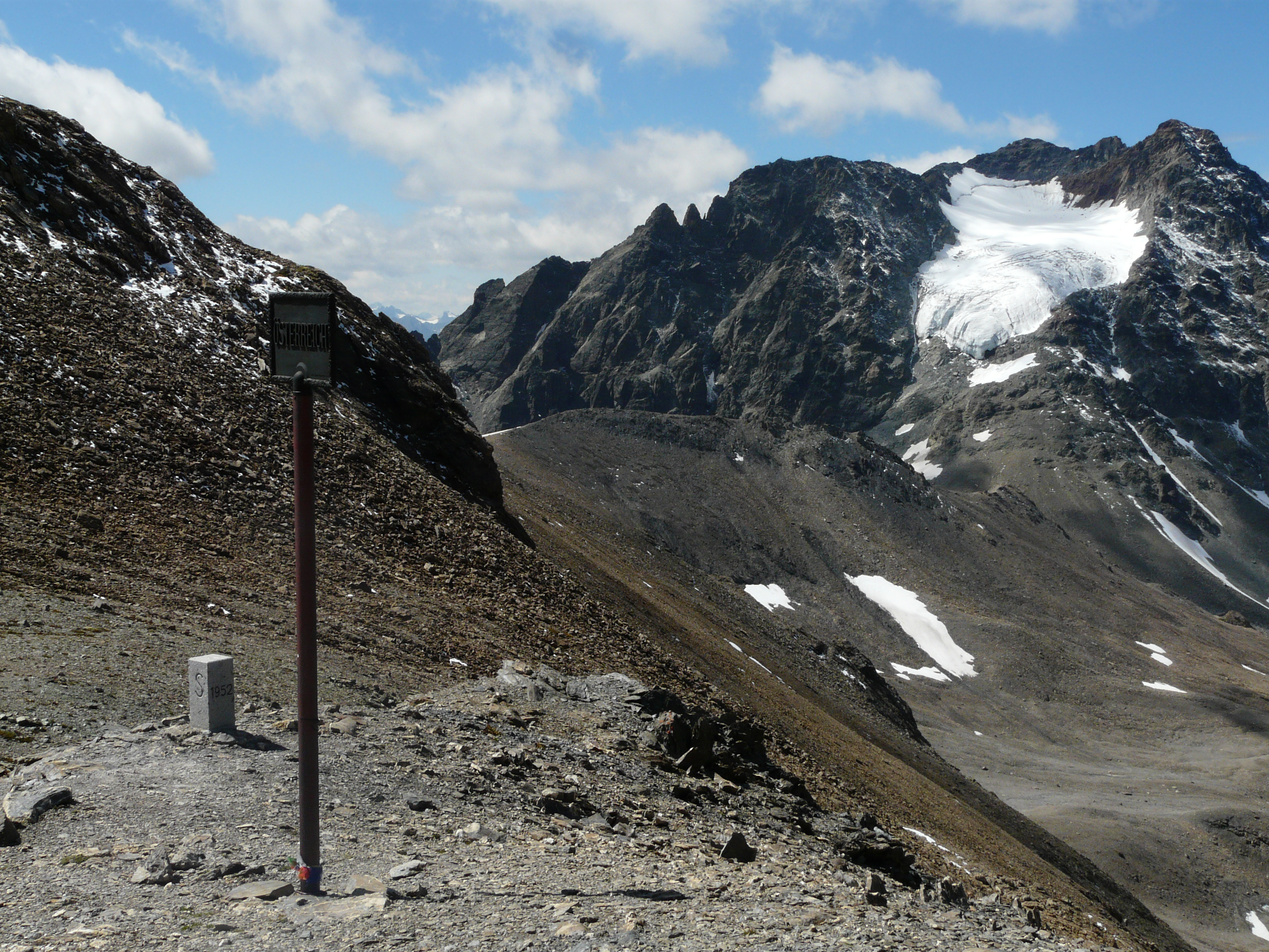 Blick vom Kronenjoch zum Pass Futschöl, Vadrat Futschöl (Hängegletscher), links davon Piz Laisch Lunga. Über der Mitte des Gletschers ist der Südgipfel, am rechtem Bildrand der Nordgipfel des Augstenberges.